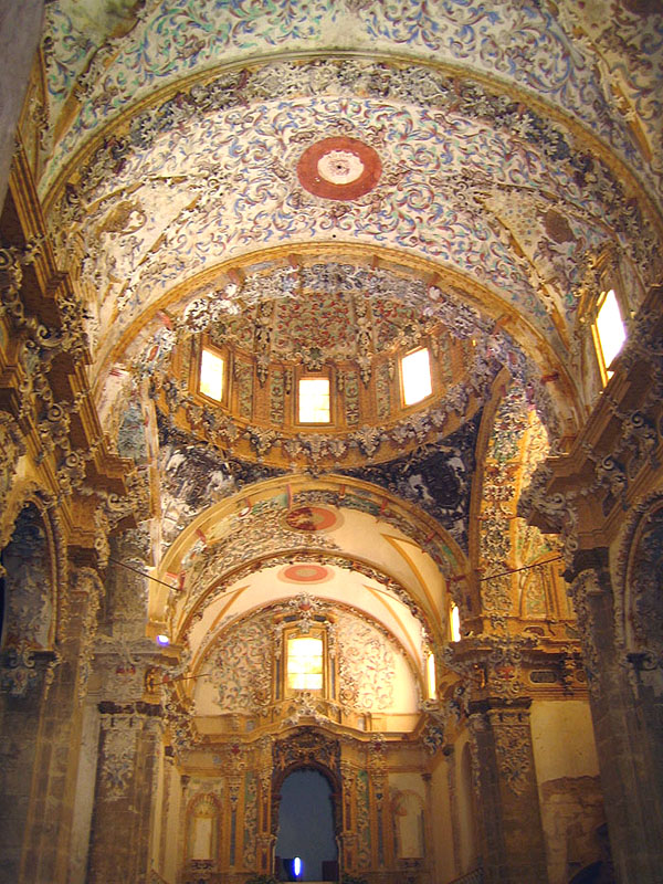 Santa Maria de Valldigna, Simat de la Valldigna, Safor, País Valencià.